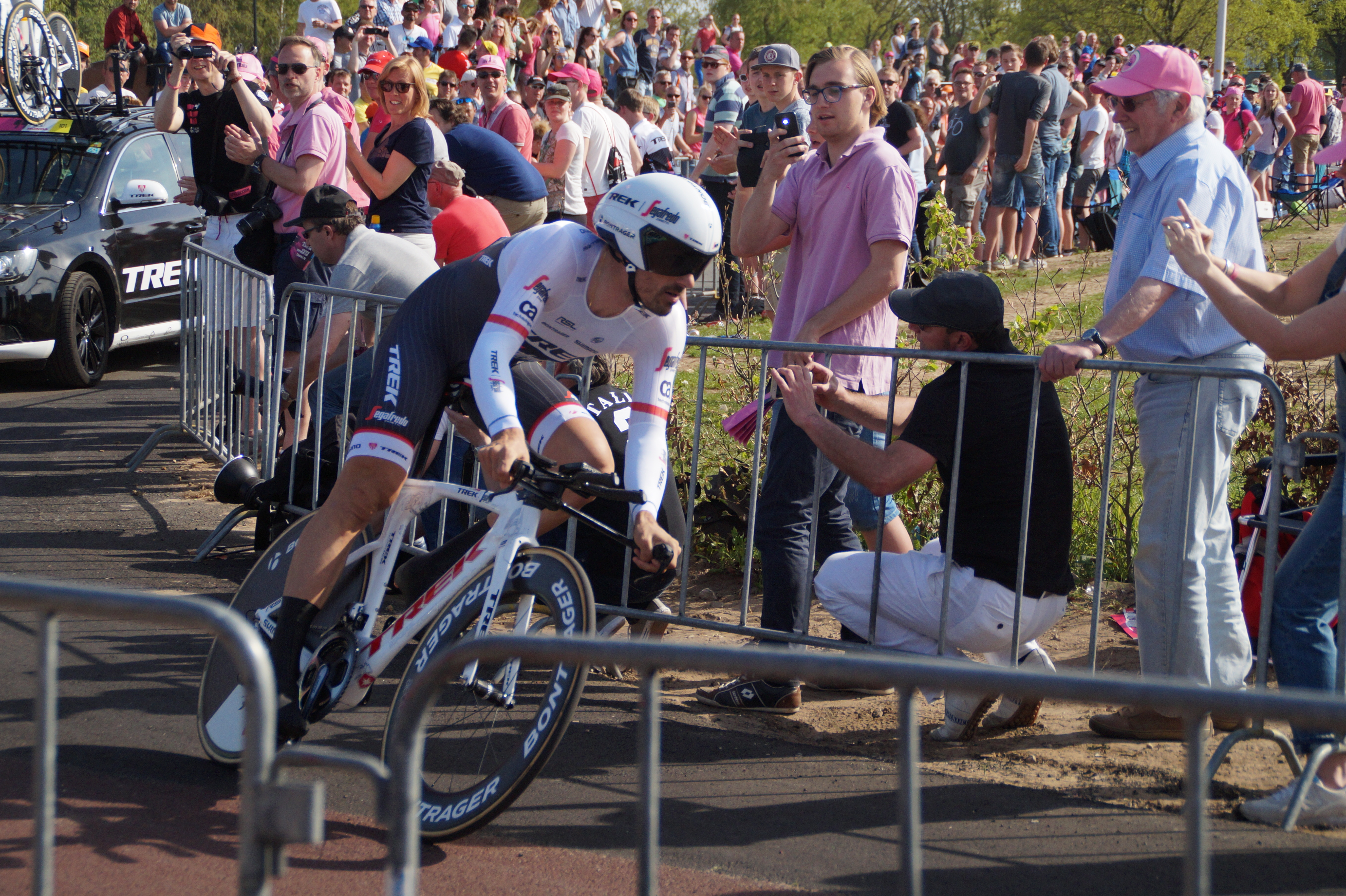 DSC05057 Fabian Cancellara